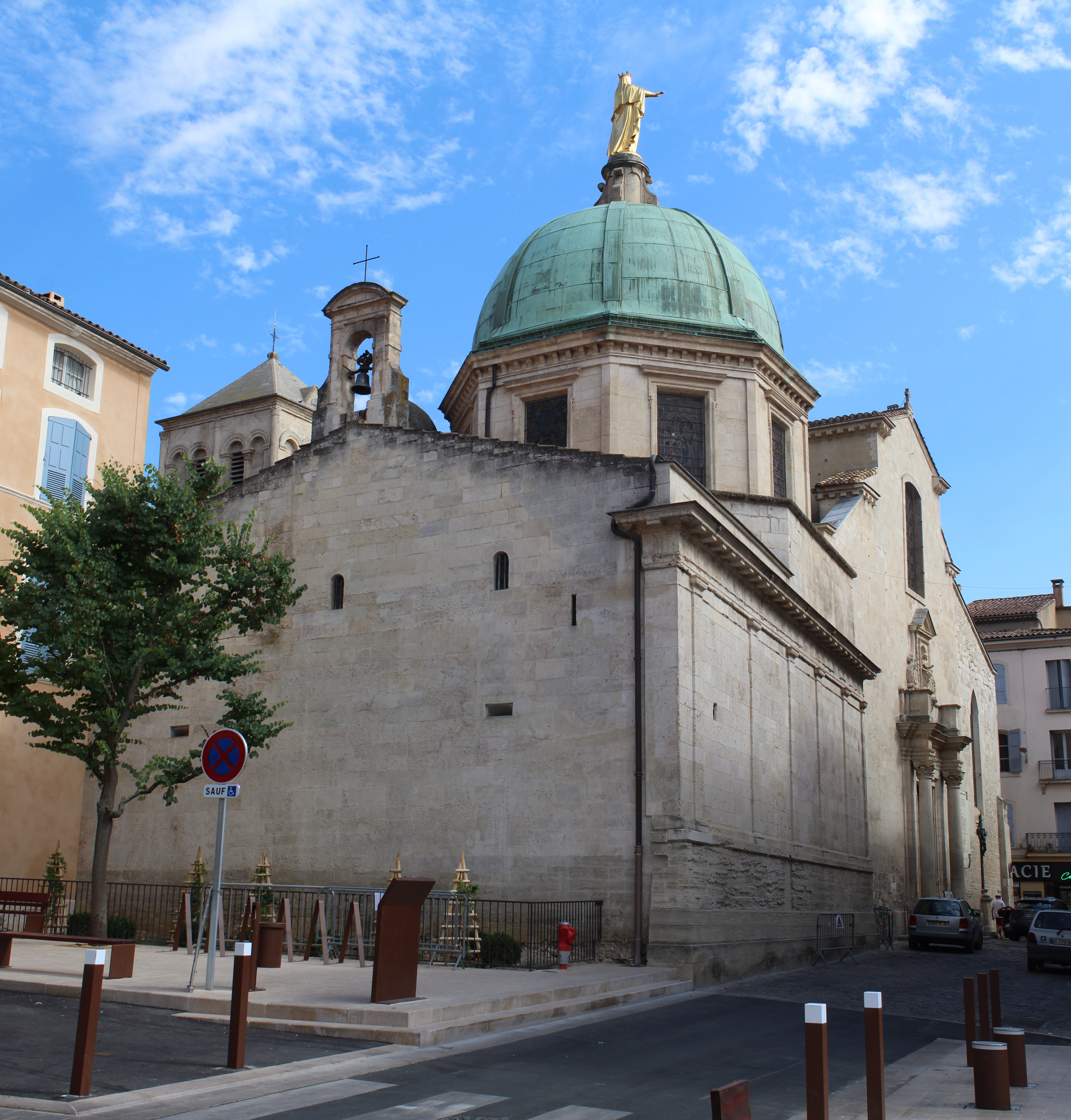 Cathédrale Sainte-Anne d'Apt.